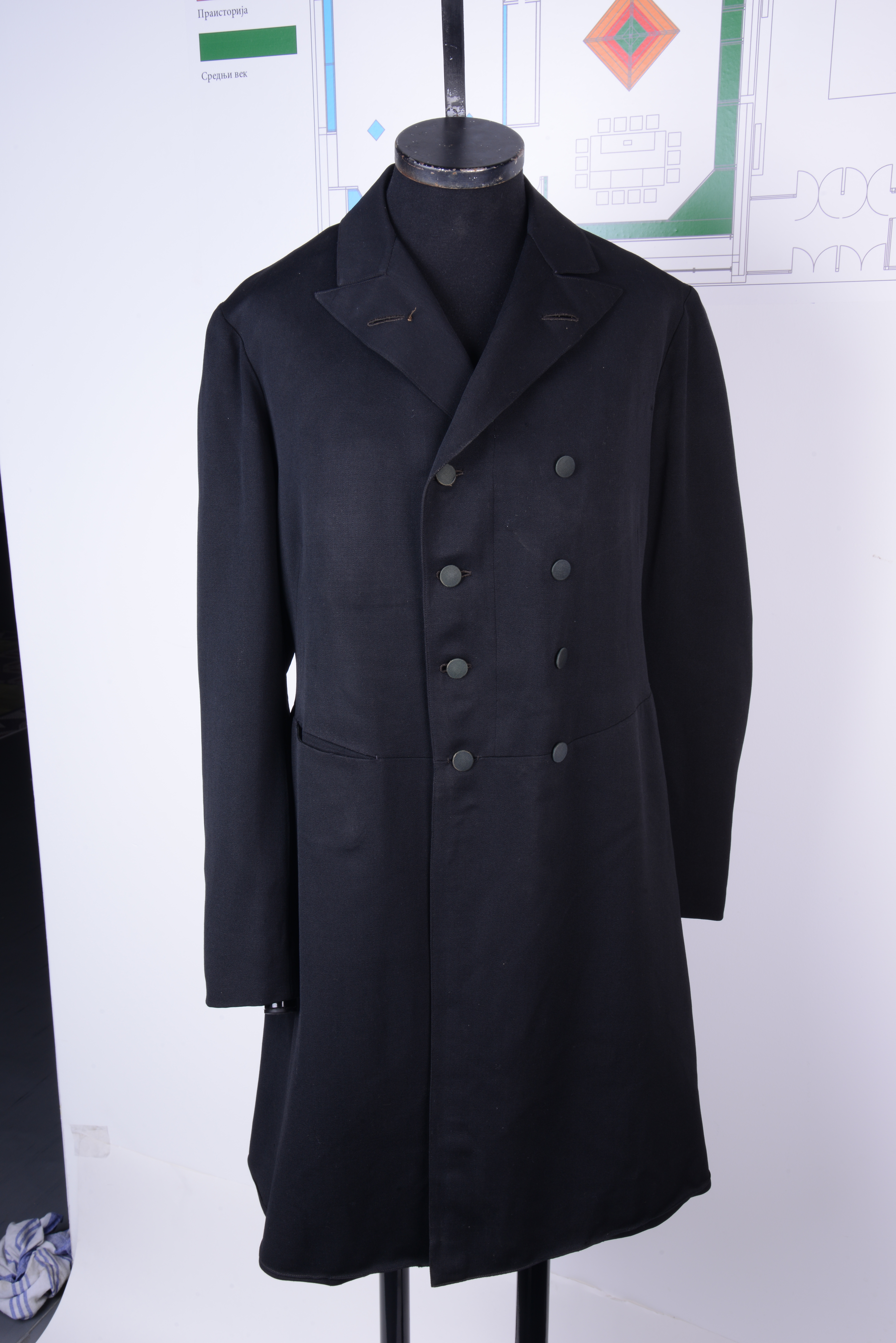 Srpski (latinica): Redengot-Dugi muški kaput od vune i kože, prva polovina XX veka. Dužine do kolena. Pripadao je Mihajlu Babamilkiću, predsedniku leskovačke opštine od 1921. do 1923. i od 1935. do 1939. godine.Poklon Đorđa Babamilkića iz Niša.